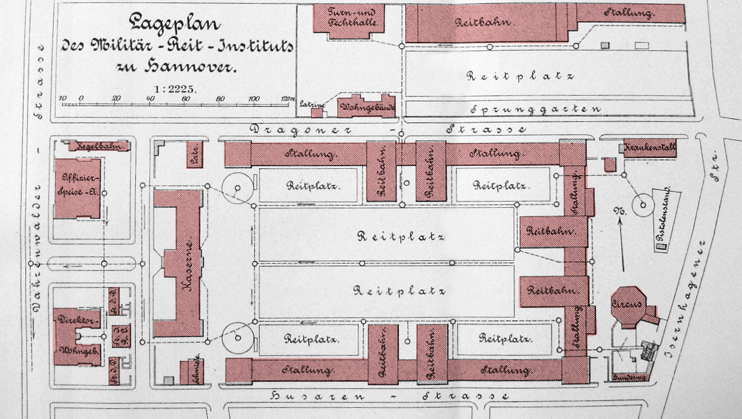 Lageplan Militärreitinstitut Hannover